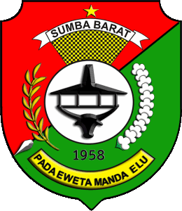 Diperoleh dari Situs Resmi Kabupaten Sumba Barat